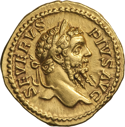 Ауреус. Септимий Север. Ок. 202—210 гг. (аверс). Надпись SEVERVS PIVS AVG. Голова Септимия Севера в лавровом венке, вправо.